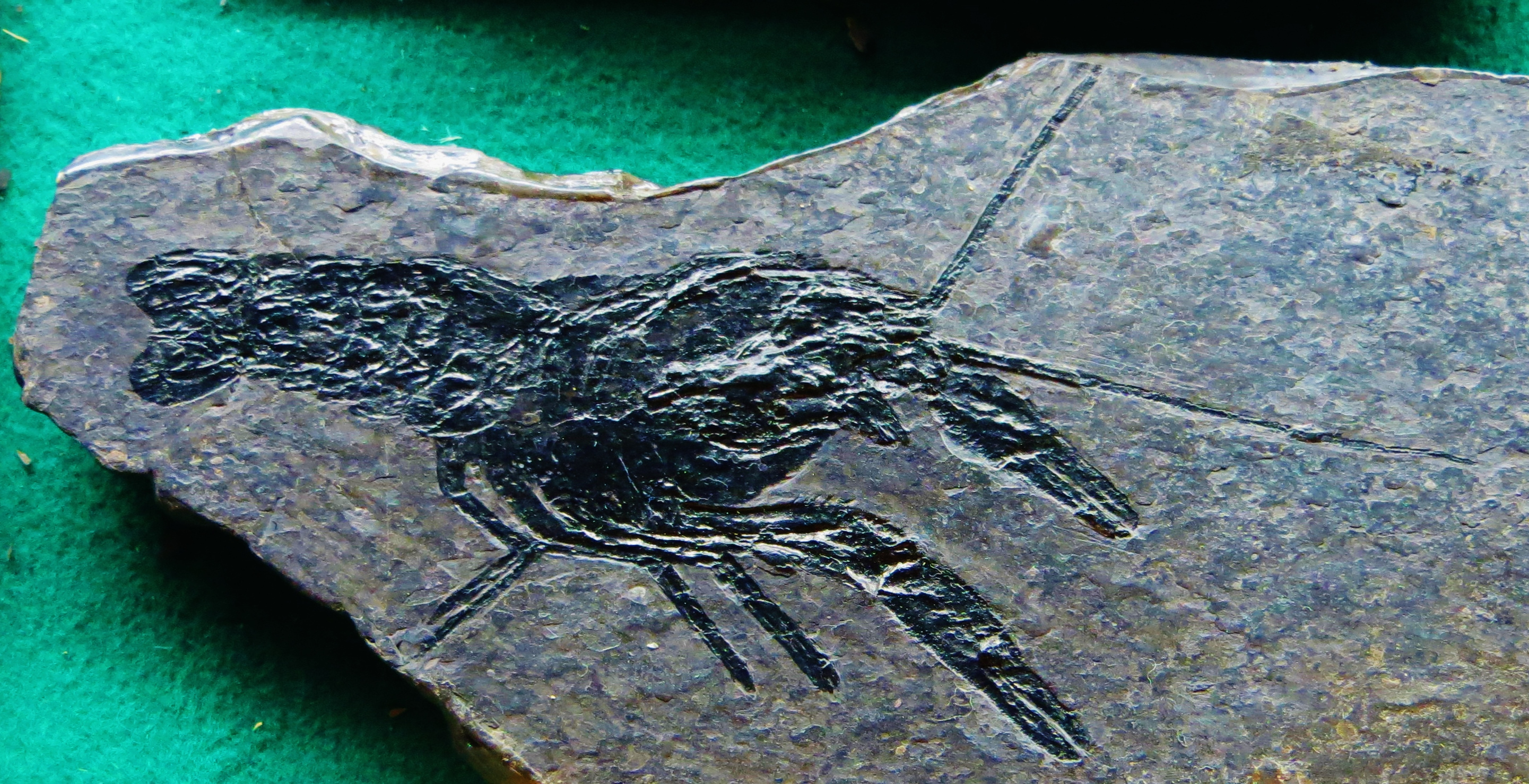 Fossil of Glaessnericaris, an extinct arthropod- Took the picture at Museo di Storia naturale “Antonio Stoppani” - Venegono Inferiore